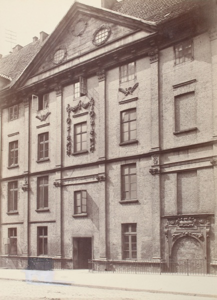 Blick auf das Gebäude Neuer Wandrahm 10; die steinerne Girlande befindet sich in der Ausstellung des Museums.